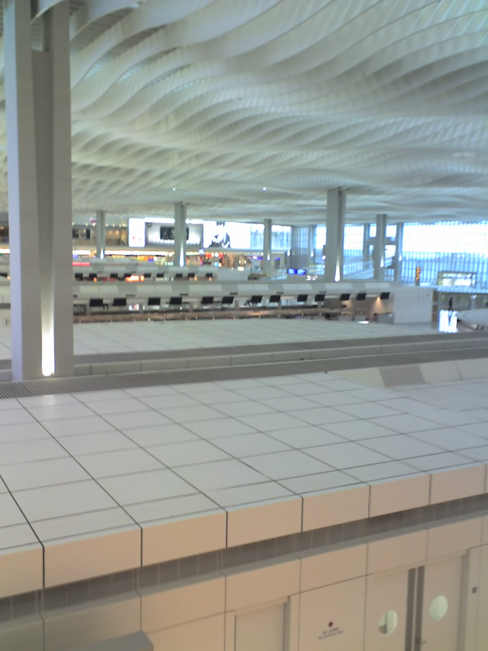 La zona delle partenze del Terminal 2.